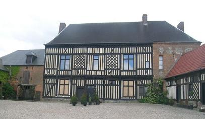 Manoir de Morvillers